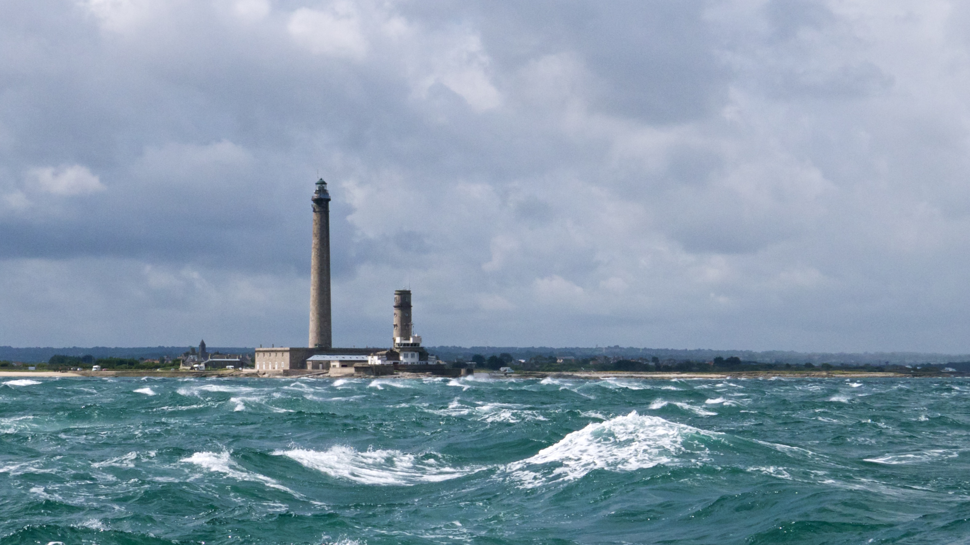 Phare de Gatteville sur la pointe de Barfleur, Normandie, France This building is en partie classé, en partie inscrit au titre des Monuments Historiques. .